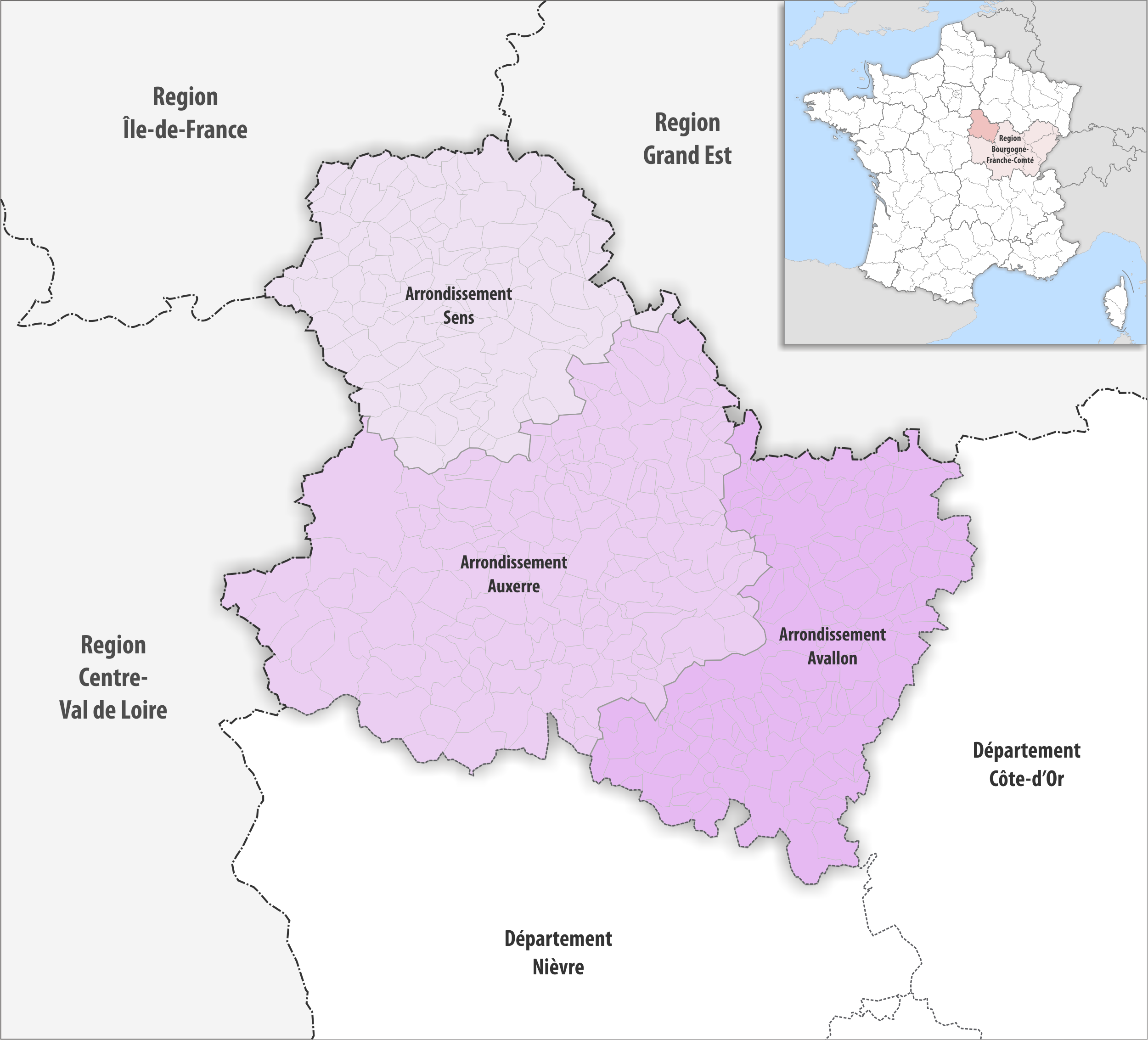 Gemeinden und Arrondissemente im Departement Yonne